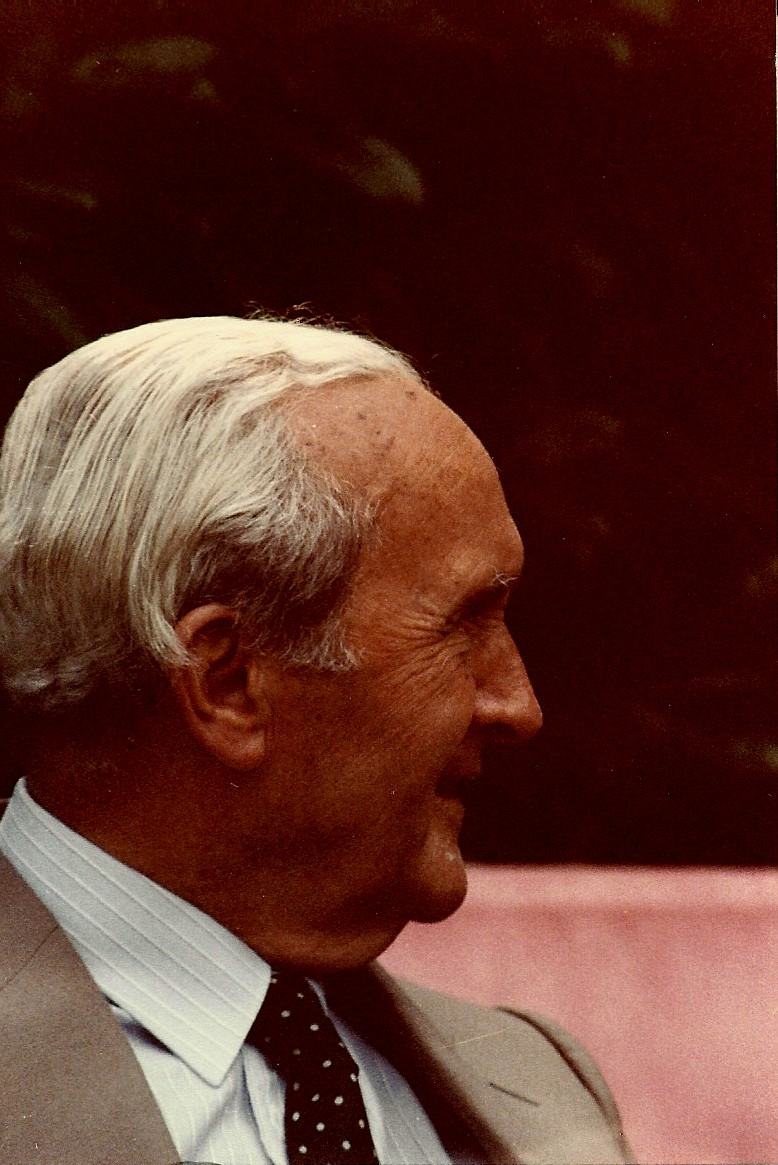 french diplomat